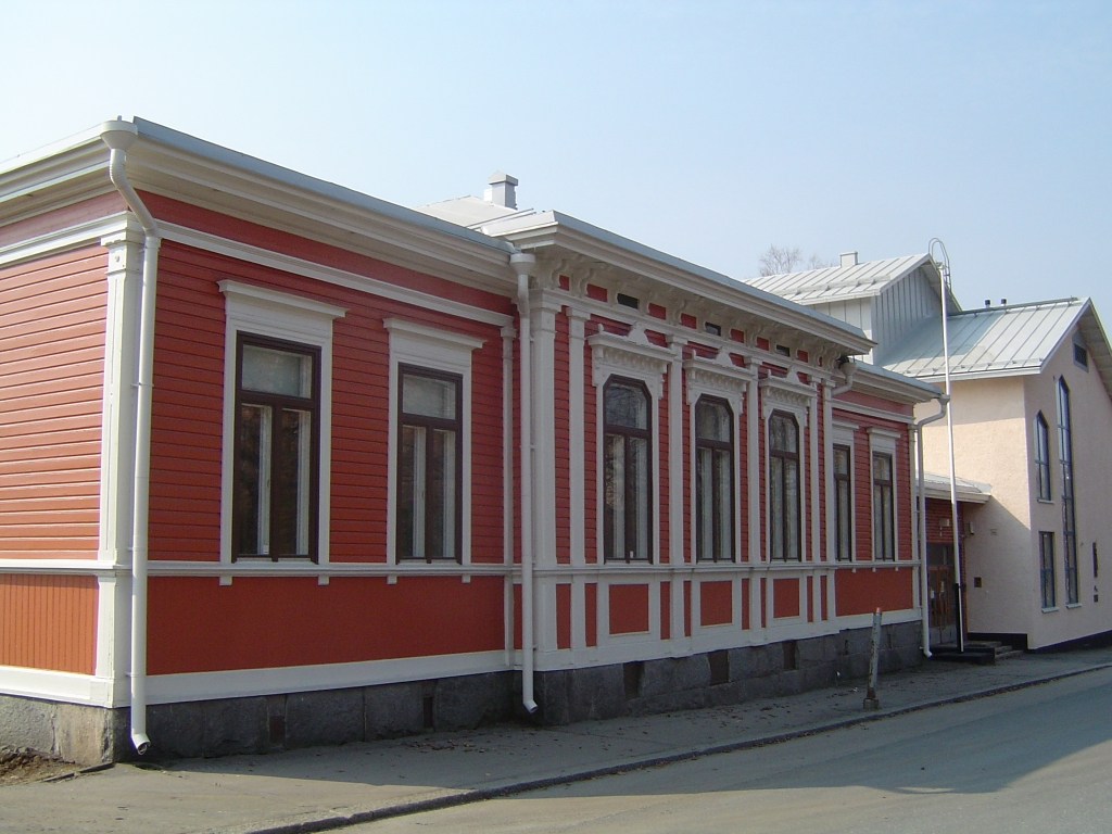 Kuopion talouskoulun päärakennus Asemakadun puolelta.